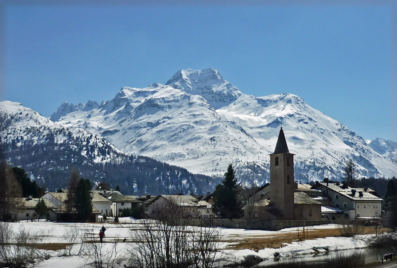 Sils-Baselgia (Reformierte Kirche und Piz Güz)